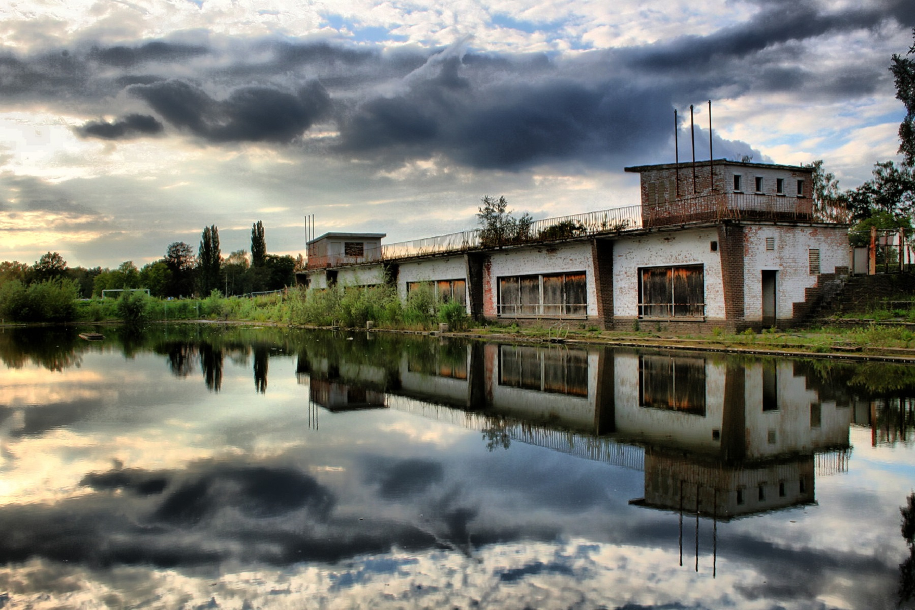 Hofstade voormalig zwembad HDR